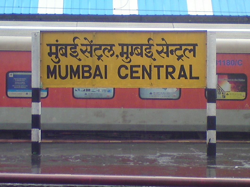 Mumbai Central cropped